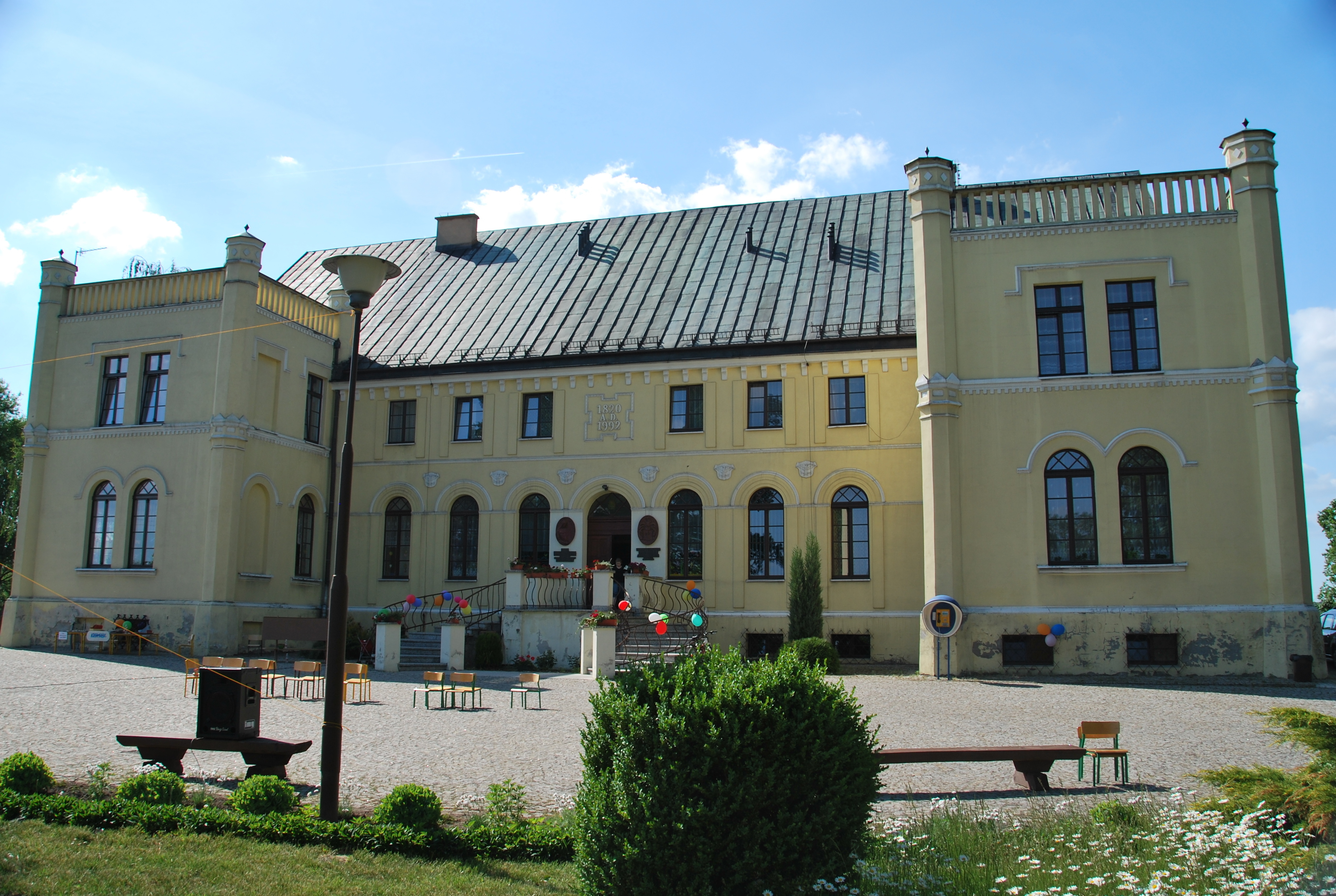 Dwór w Żołędowie, rok budowy 1820